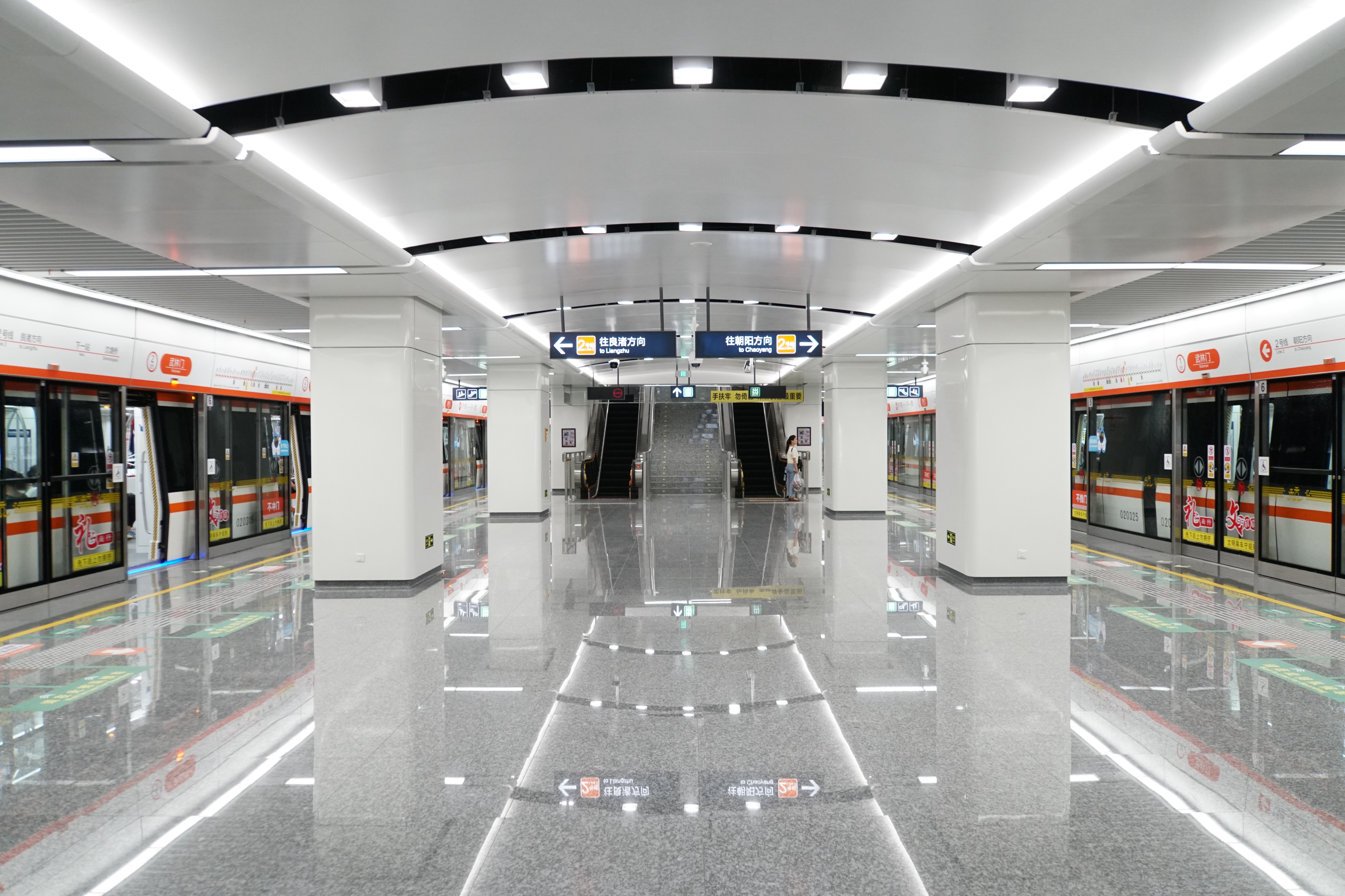 武林门站站台